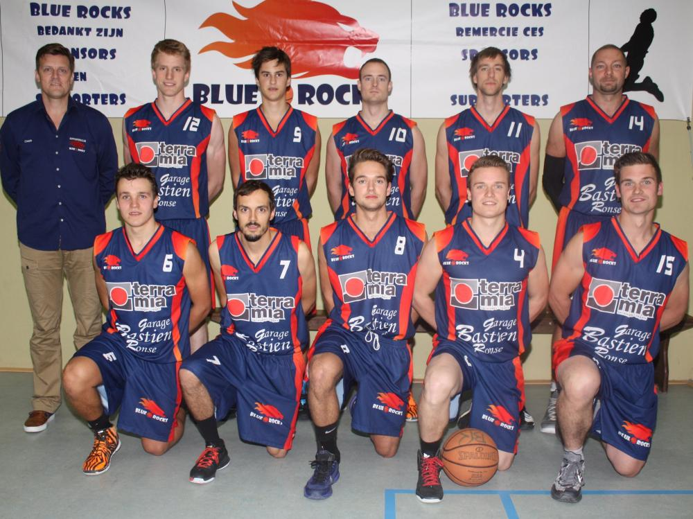 Blue Rocks A 2015-2016